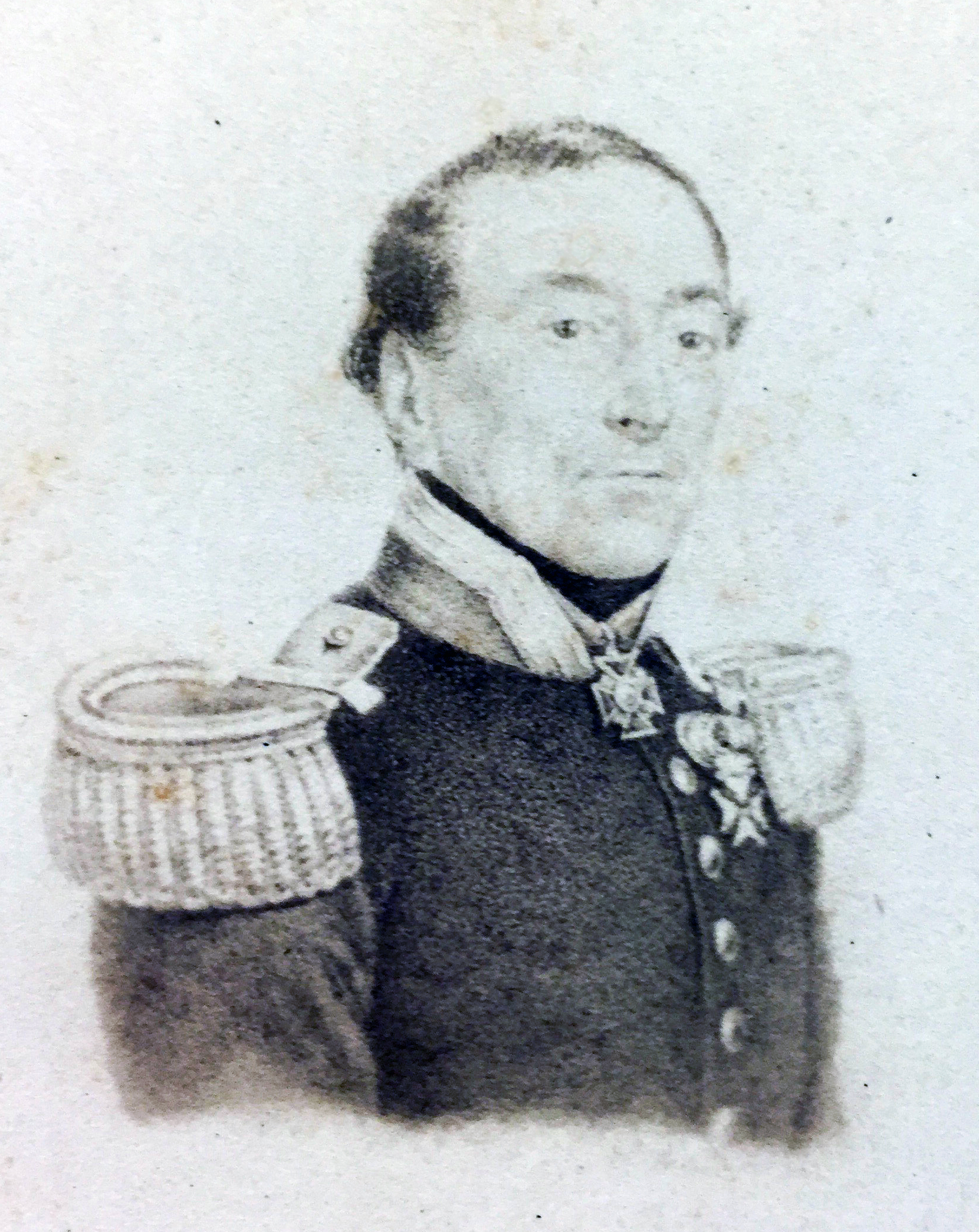 Johannes Vertholen, commandeur Russische Orde van Sint-Anna (1814), ridder MWO 4e klasse (1815), ridder MWO 3e klasse, luitenant-kolonel (1815), commandant vesting Breda (1814, 1815, 1816), opperbevelhebber ad interim vesting Breda (1834), generaal-majoor der cavalerie